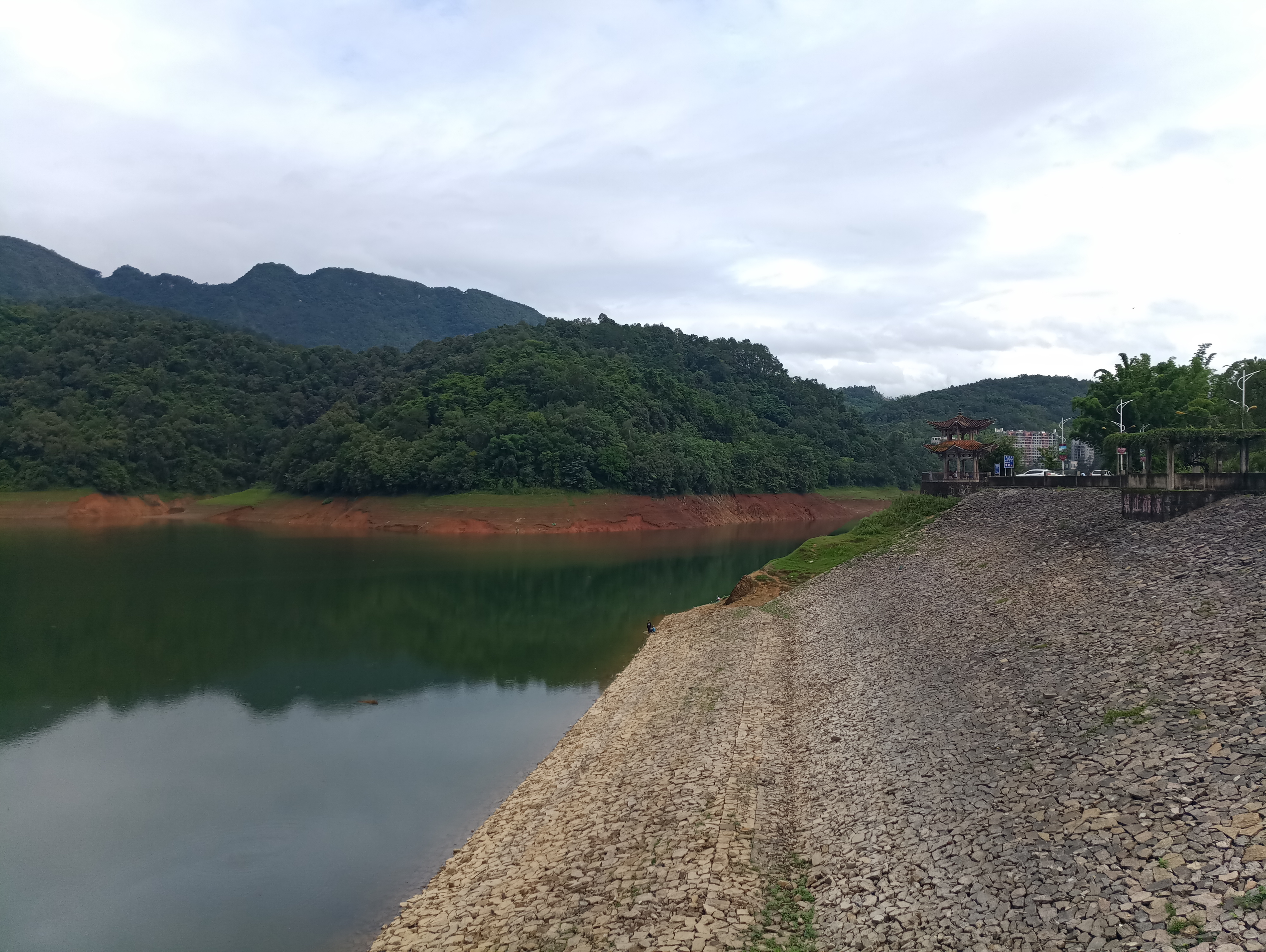 中文（中国大陆）: 芒市孔雀湖